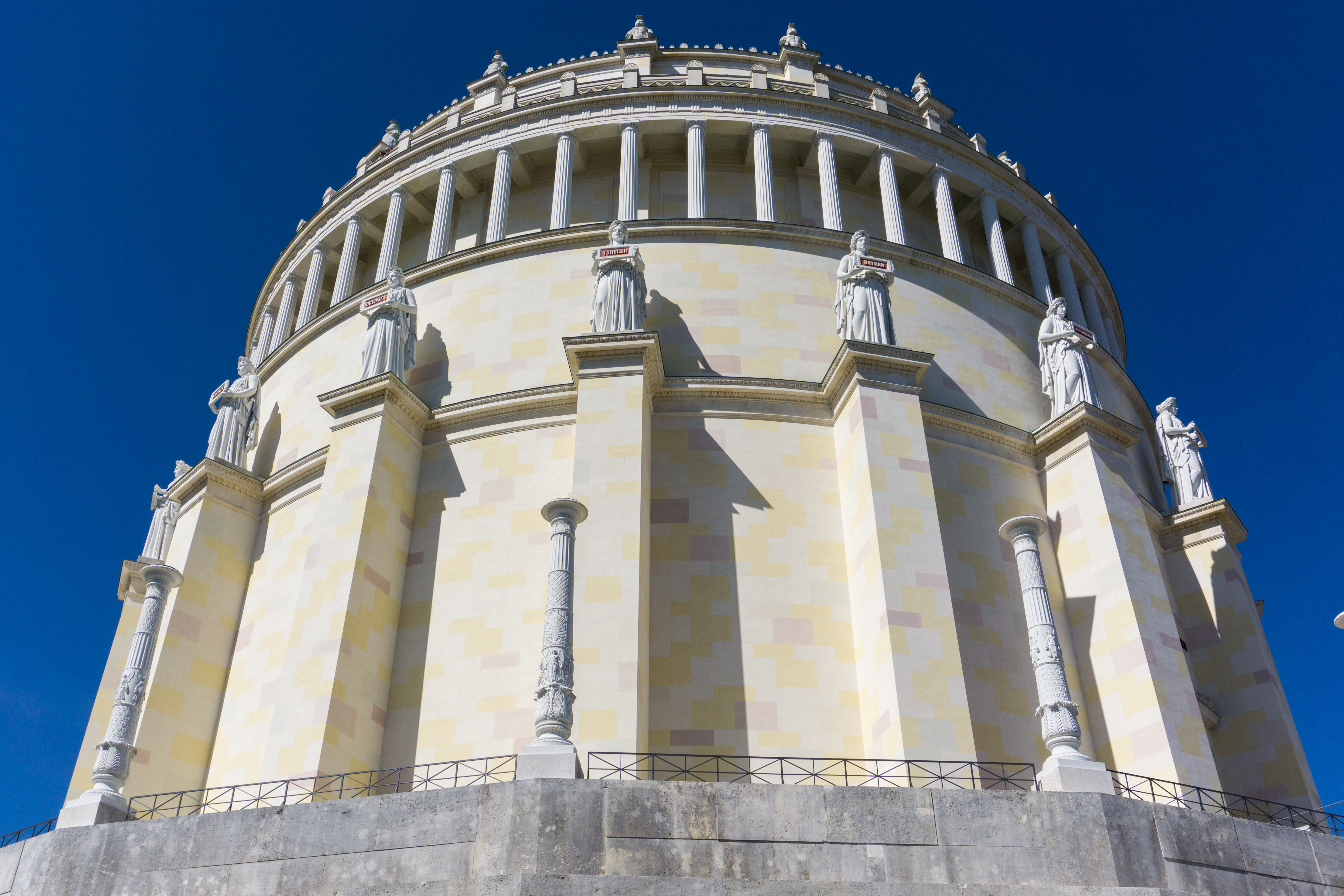 Befreiungshalle nach dem Umbau 2017, im Frühjahr 2018.